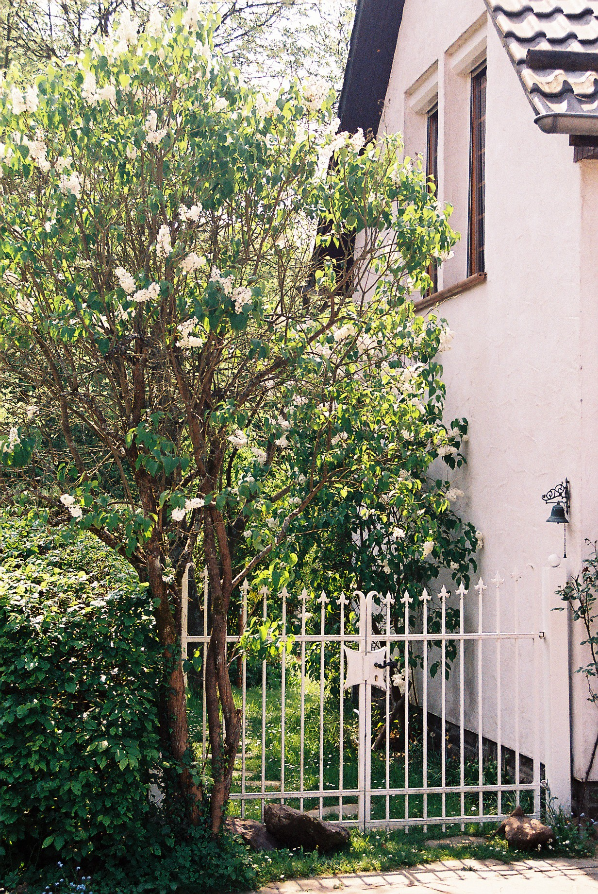 Haus von Franz M. Jansen und Fifi Kreutzer im Bröltal, Gartenpforte